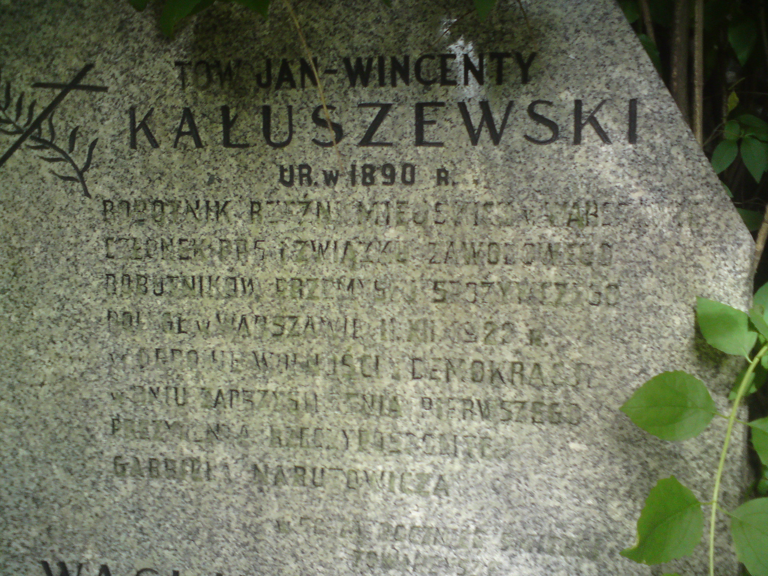 Grób Jana Kałuszewskiego, członka PPS, który zginał 11 grudnia 1922 w trakcie manifestacji